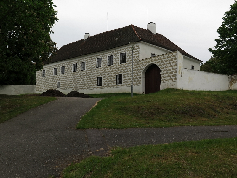 Zájezdní hostinec, Chotýčany 17, Chotýčany.